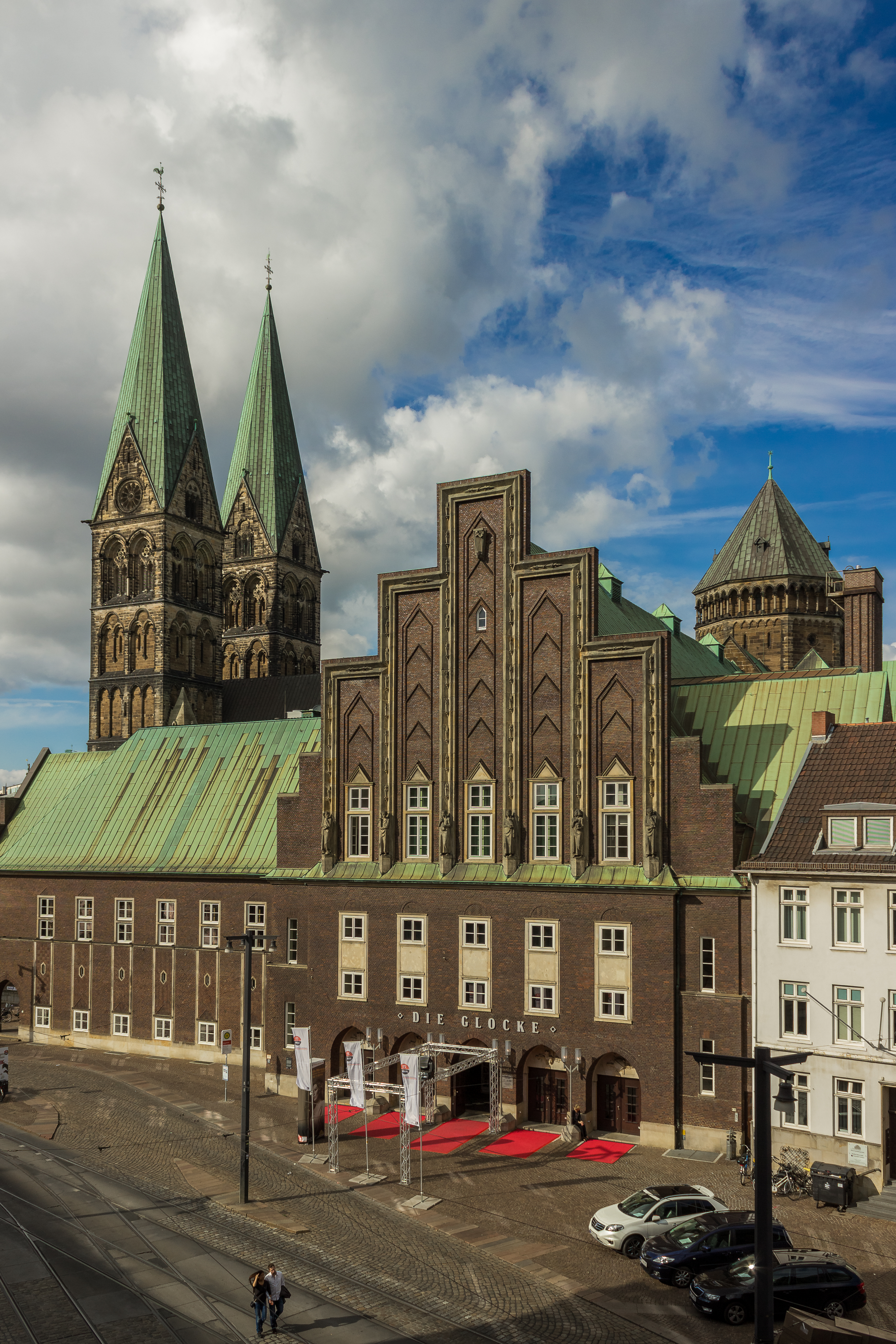 Dominsel in Bremen, Am Dom 1Die Denkmalgruppe ist ein geschütztes Kulturdenkmal in der Freien Hansestadt Bremen, mit der Nr. 0315 beim Landesamt für Denkmalpflege registriert.